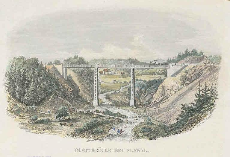 Eisenbahnbrücke der St.Gallisch-Appenzellischen Eisenbahn über die Glatt bei Egg, Flawil